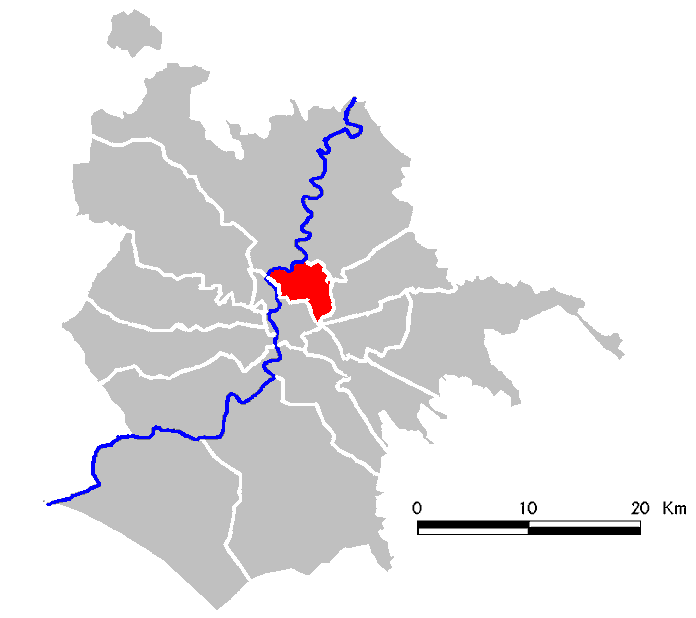 Municipio Roma II